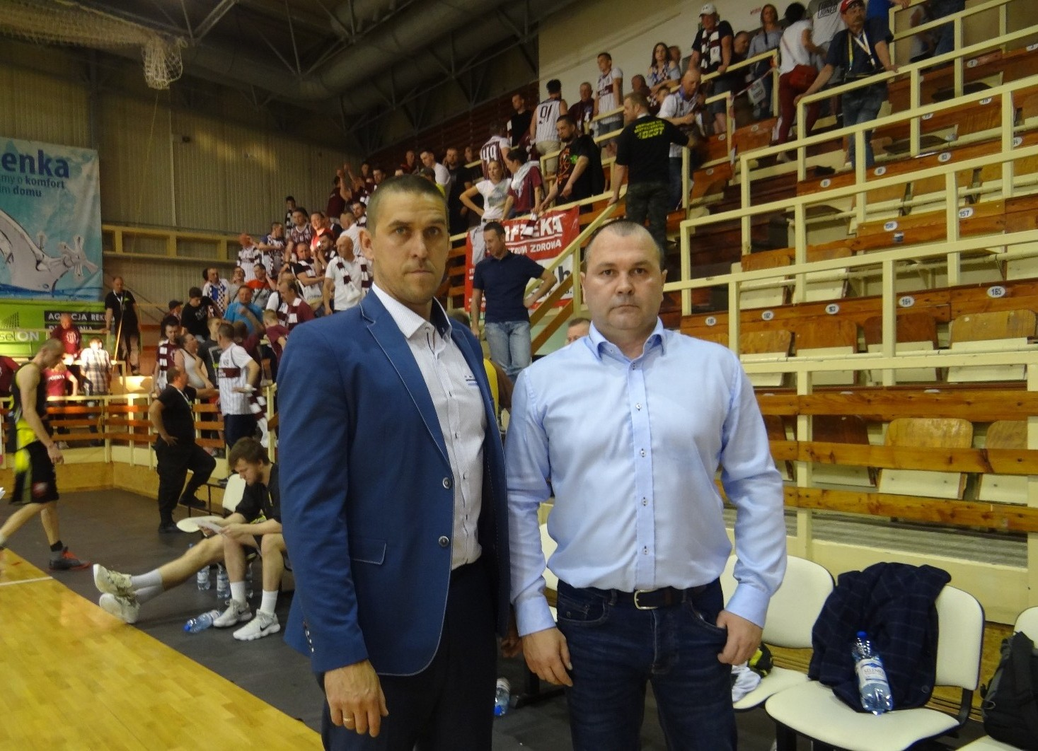 Trenerzy Sokoła Łańcut po meczu ze Spójnią Stargard (12.05.2018)